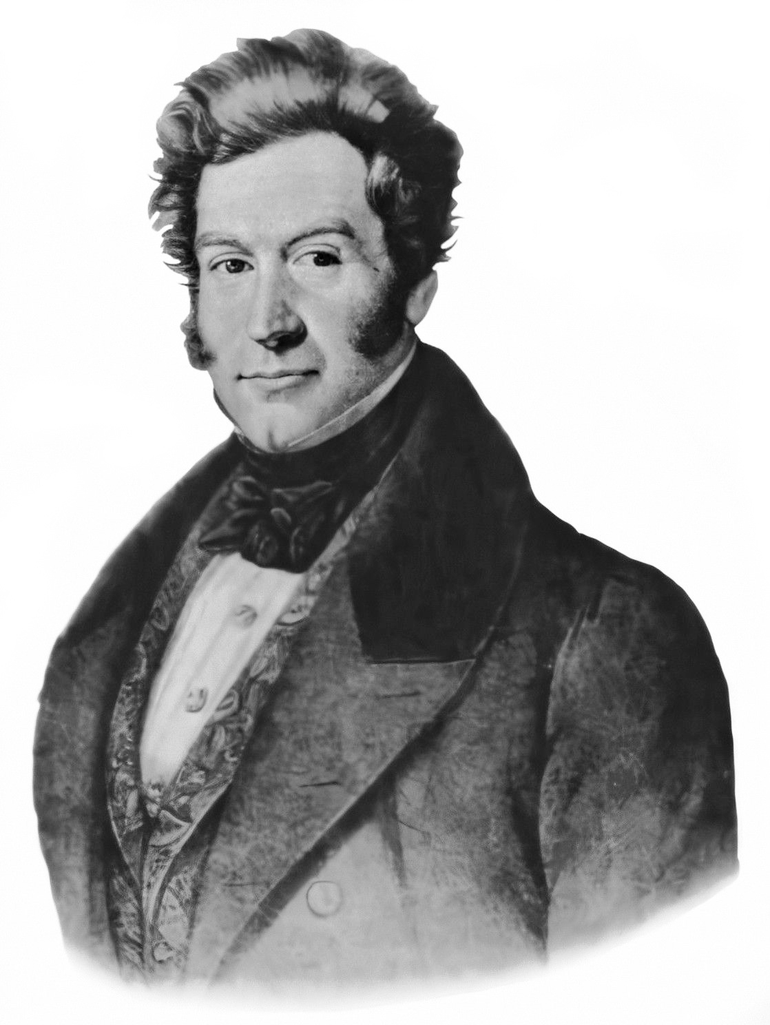 Jorge Beauchef Isnel (1787, Velay, Francia - 10 de junio de 1840, Santiago de Chile), militar francés que participó en las guerras napoleónicas y posteriormente en la guerra de la independencia de Chile.